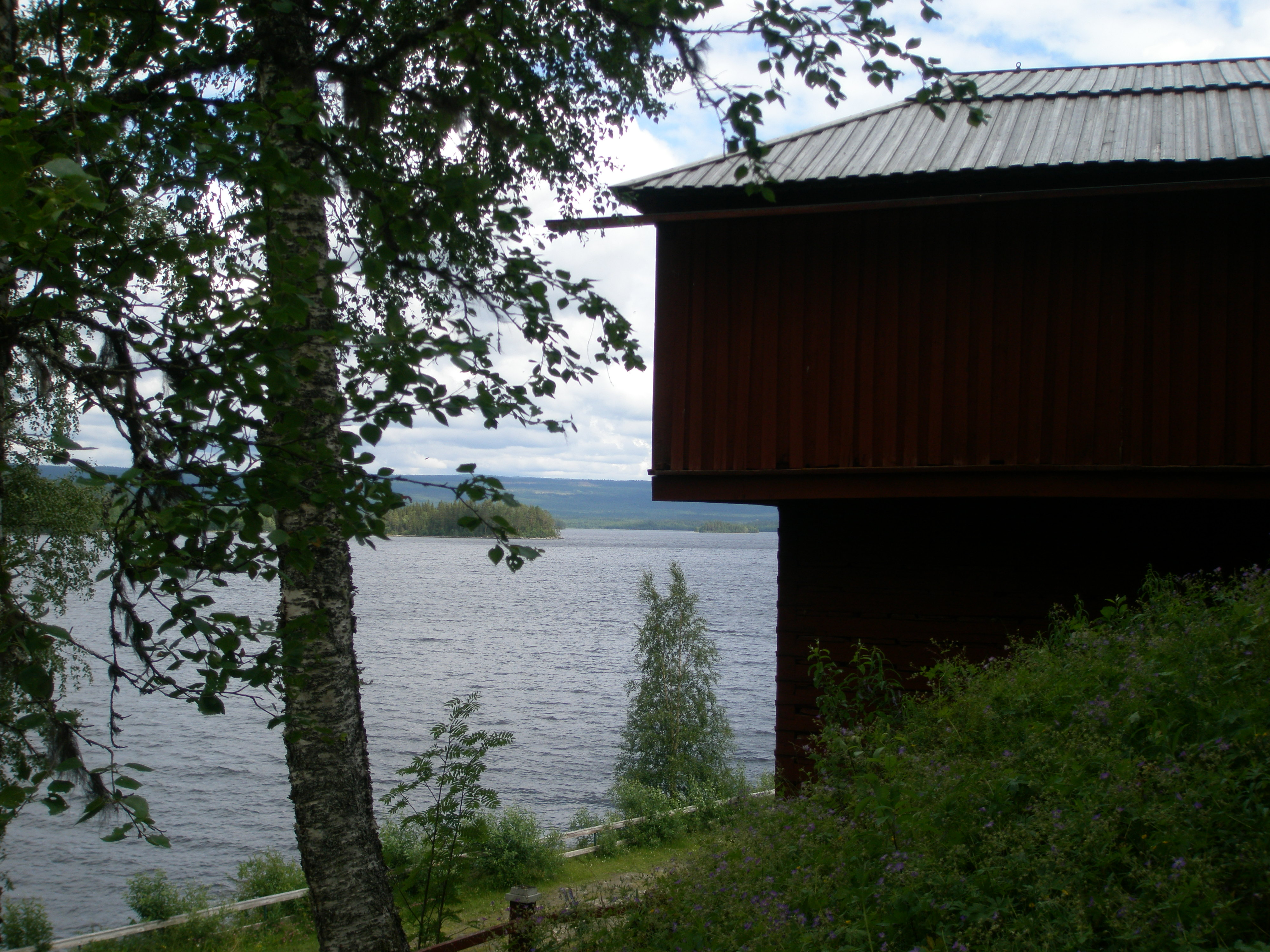 Rönnöfors järnbruksruin vid Landösjön, Rönnöfors, Offerdals socken, Krokoms kommun, Jämtland, Sverige.